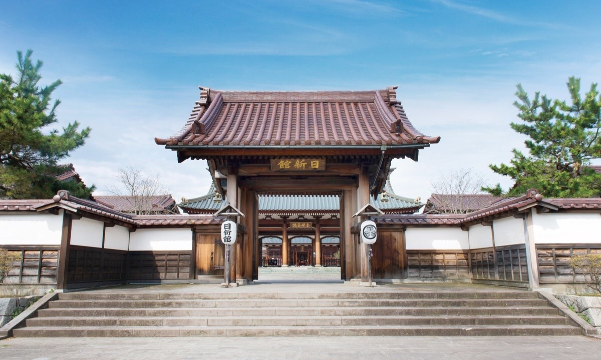 會津藩校日新館の南門。